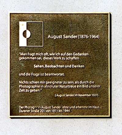 Gedenktafel am Wohnhaus von August Sander. Dürenerstraße 201, Köln-Lindenthal